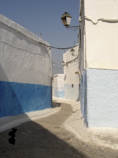 Rues de la Kasbah des Oudaïa